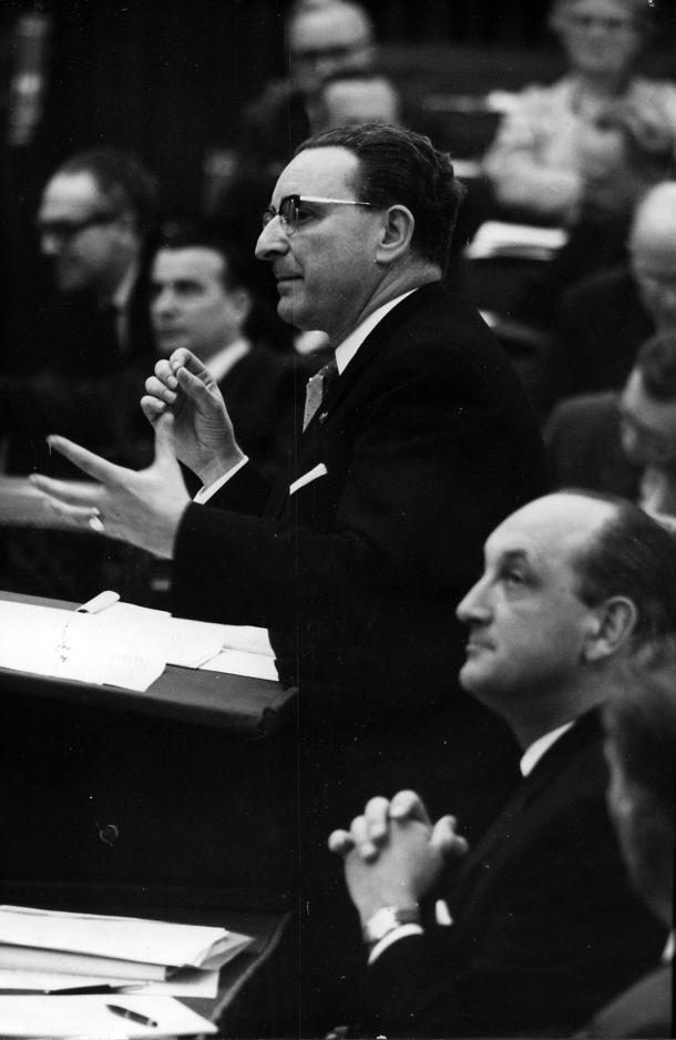 Rooy, C.J.M.A. van (KVP). Minister van Rooy beantwoordt vanachter de regeringstafel vragen uit de Tweede Kamer. Rechts minister Toxopeus. Nederland, Den Haag, 26 april 1961.